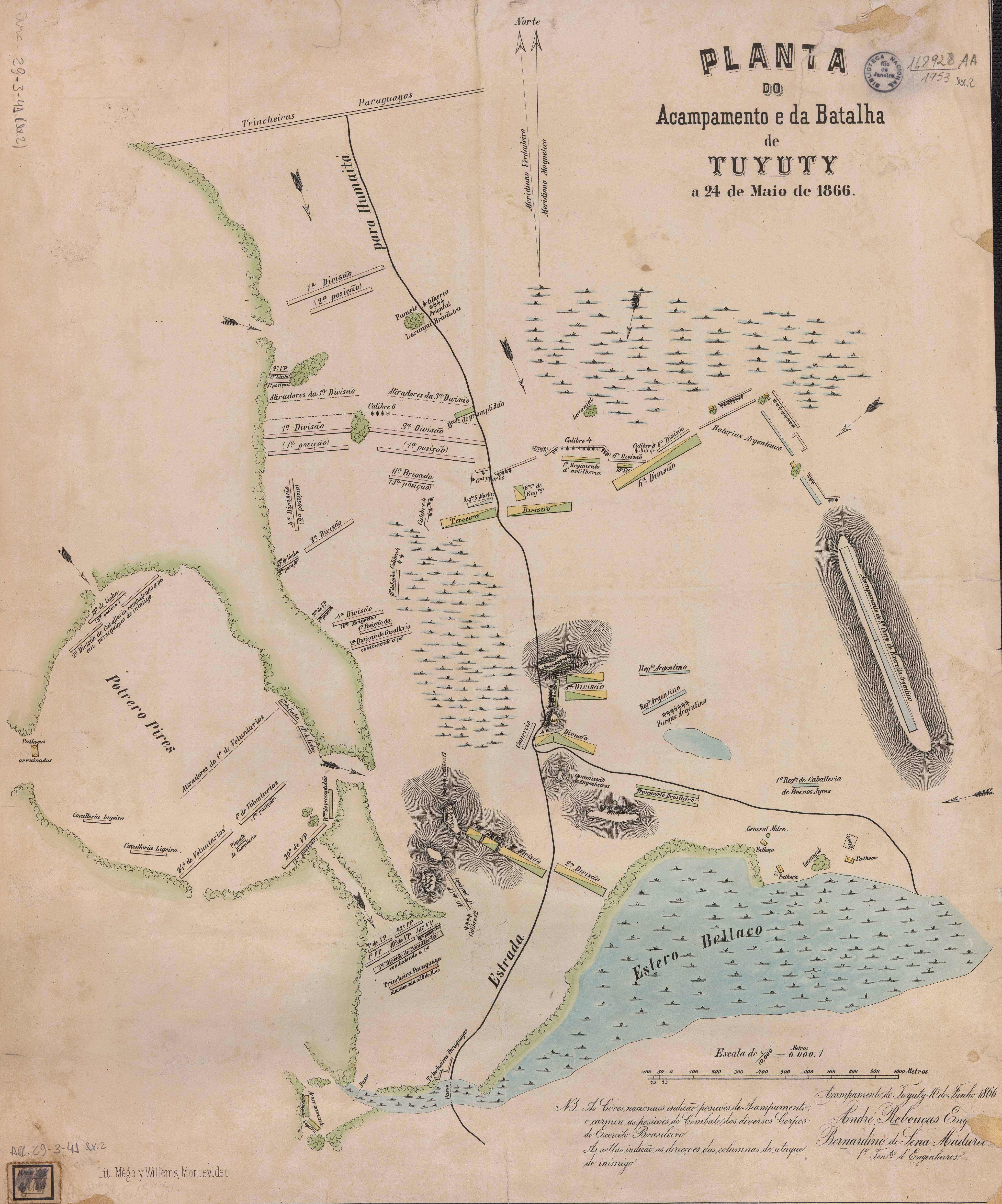 Planta do acampamento e da Batalha de Tuyuty a 24 de maio de 1866.